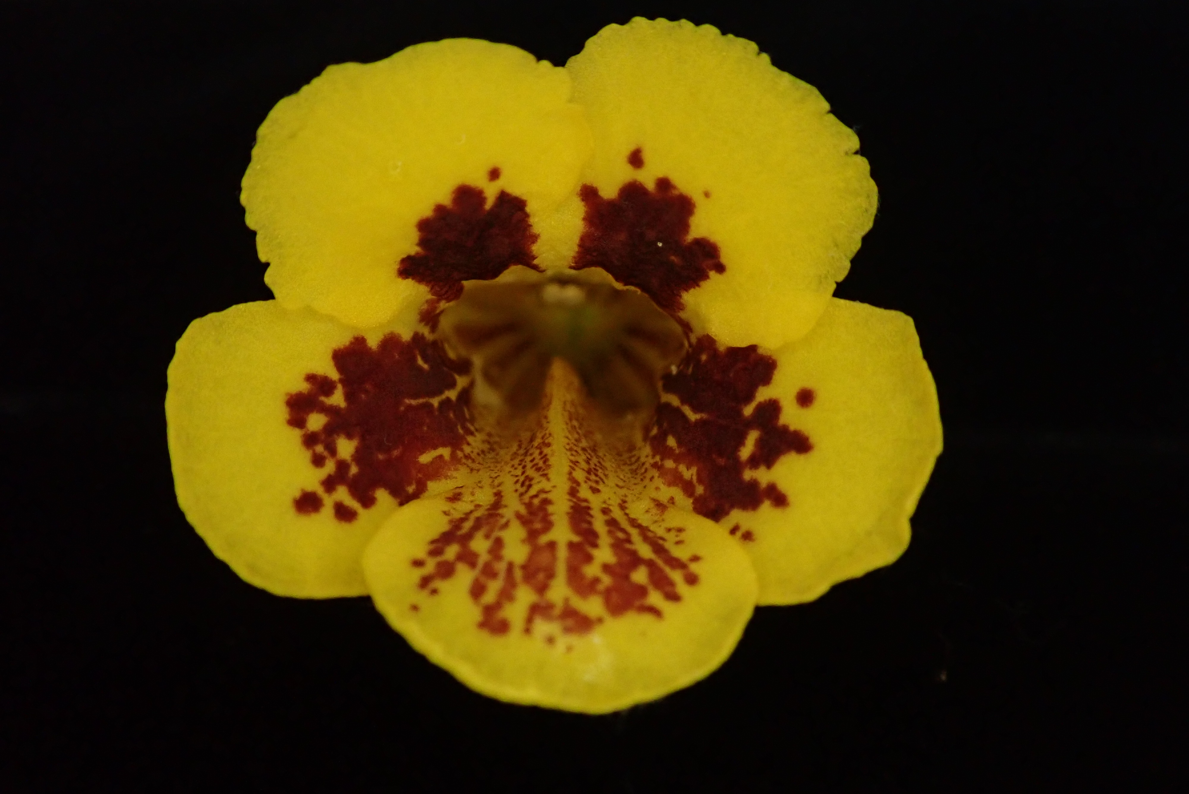 俄氏草花正面